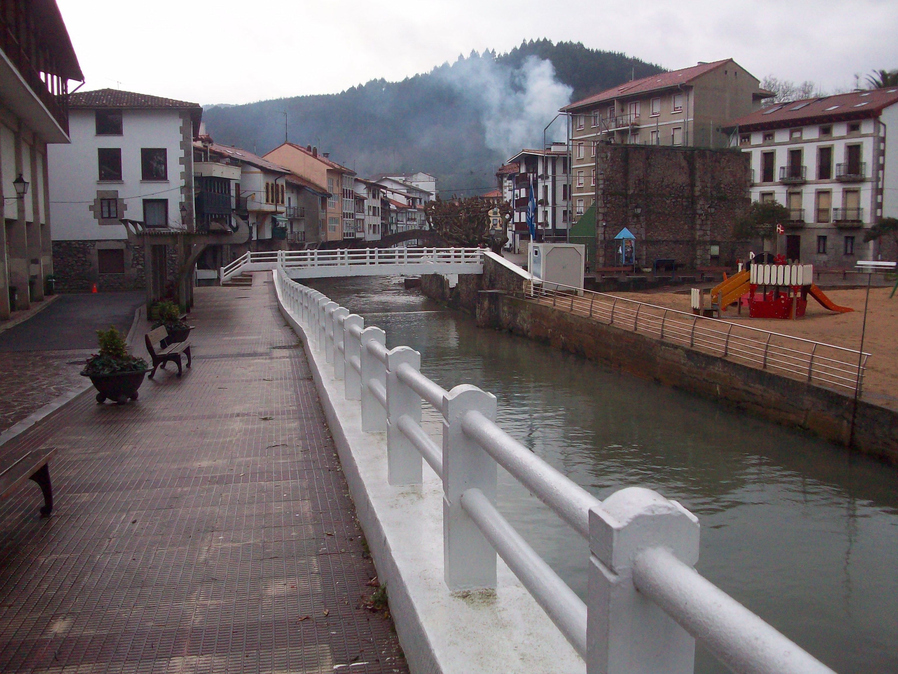 Ea. Bizkaia, Euskal Herria. Ea. Biscay, Basque Country.